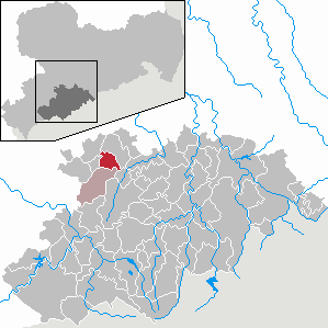 Niederdorf in Saxony - Erzgebirgskreis